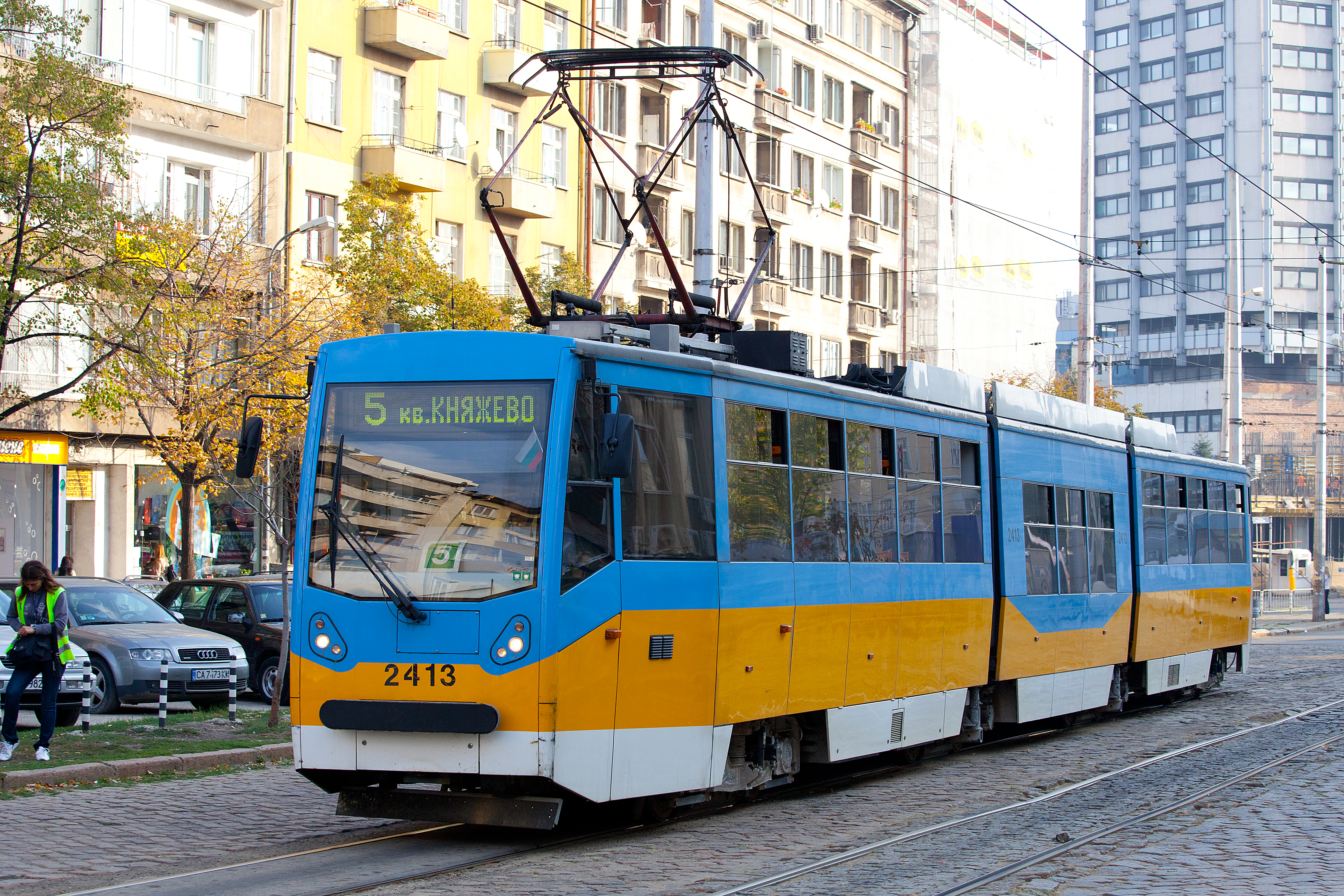 Straßenbahn in Sofia